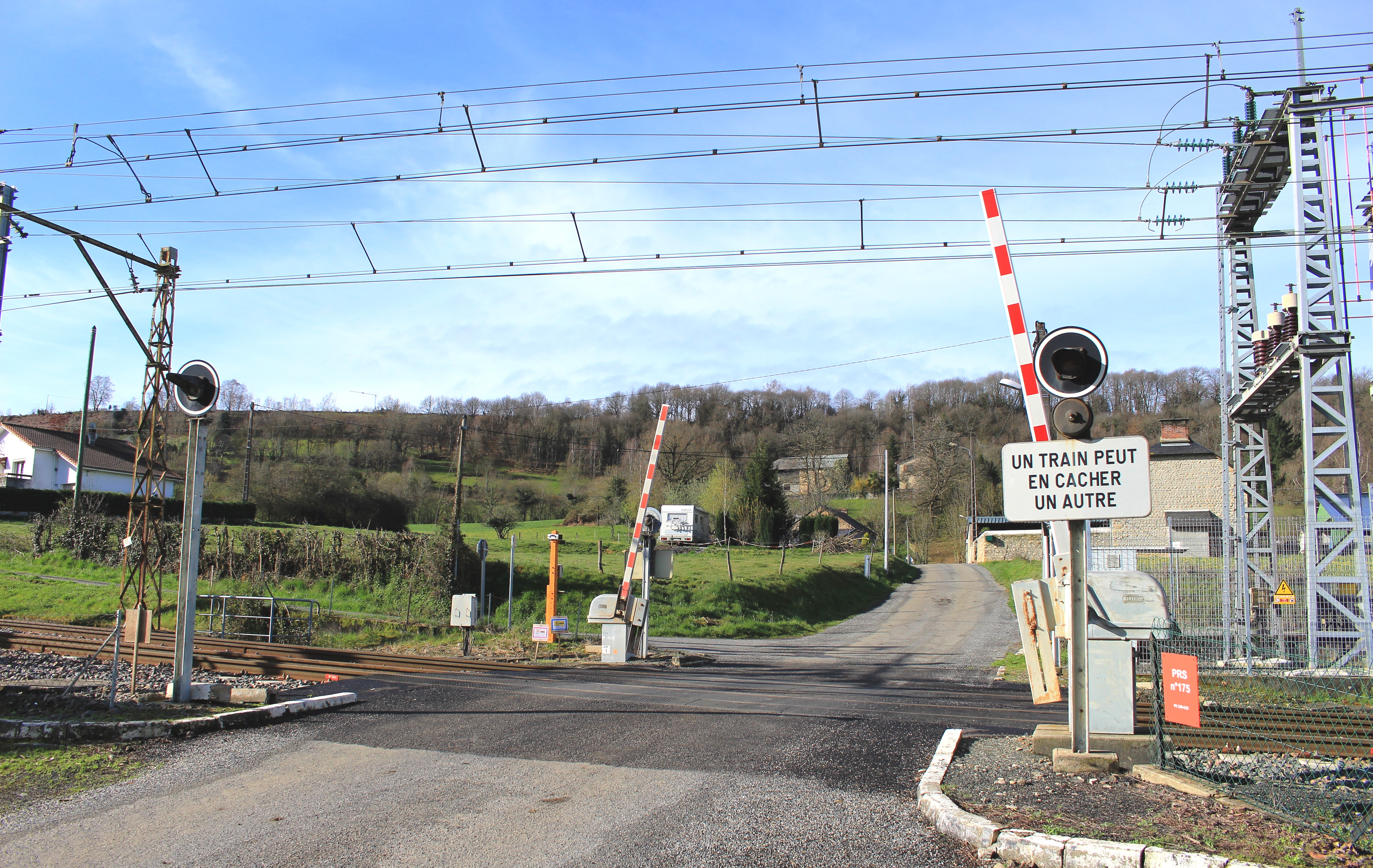 Passage à niveau de Péré (Hautes-Pyrénées)